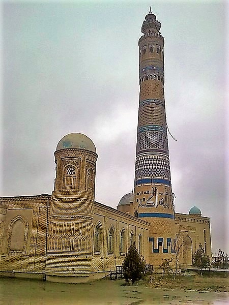 город Турткуль. Мечеть